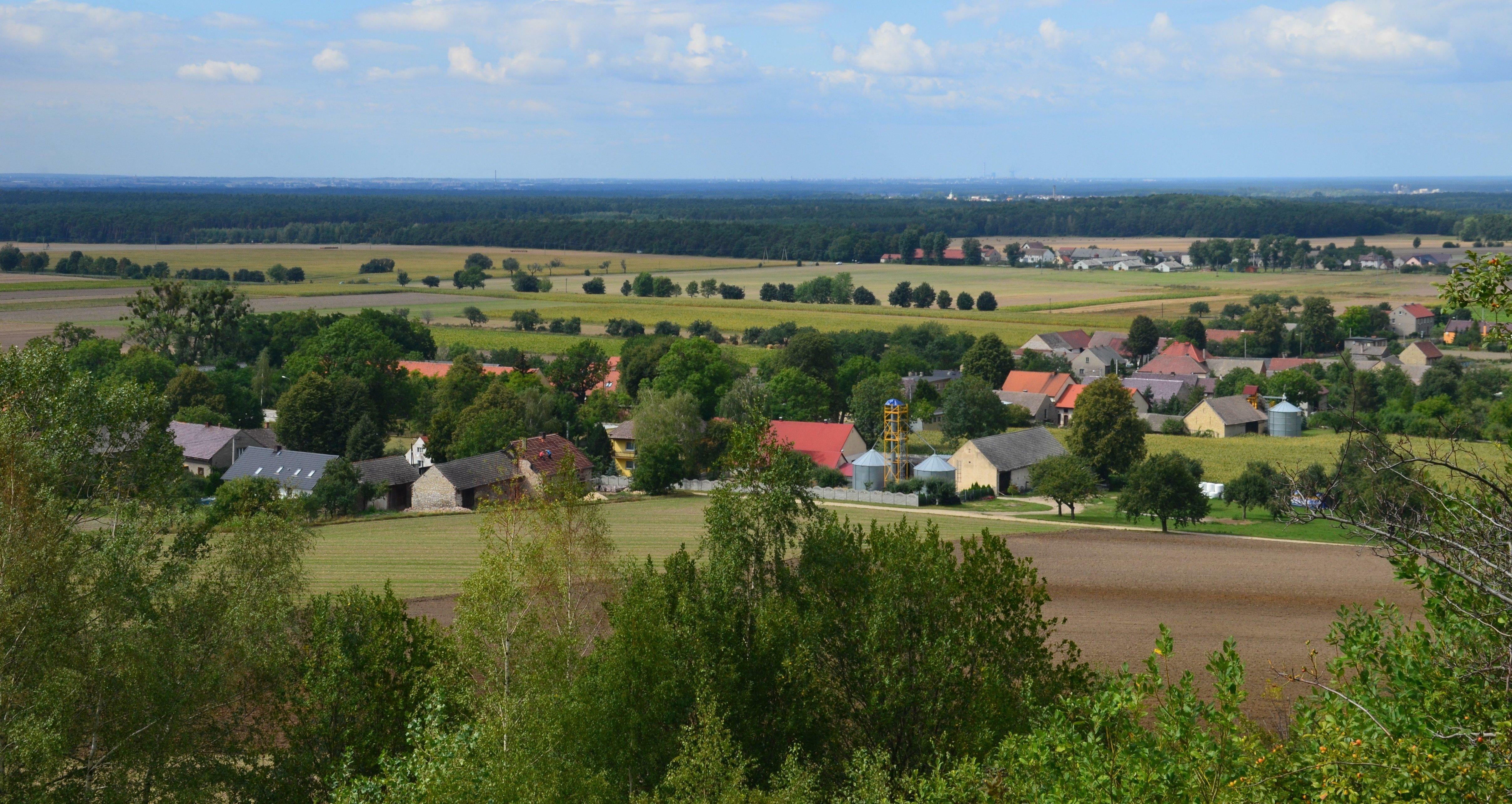 Ligota Dolna, widok z pasa startowego szybowców .